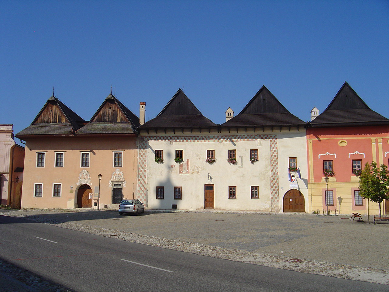 Spišská Sobota square